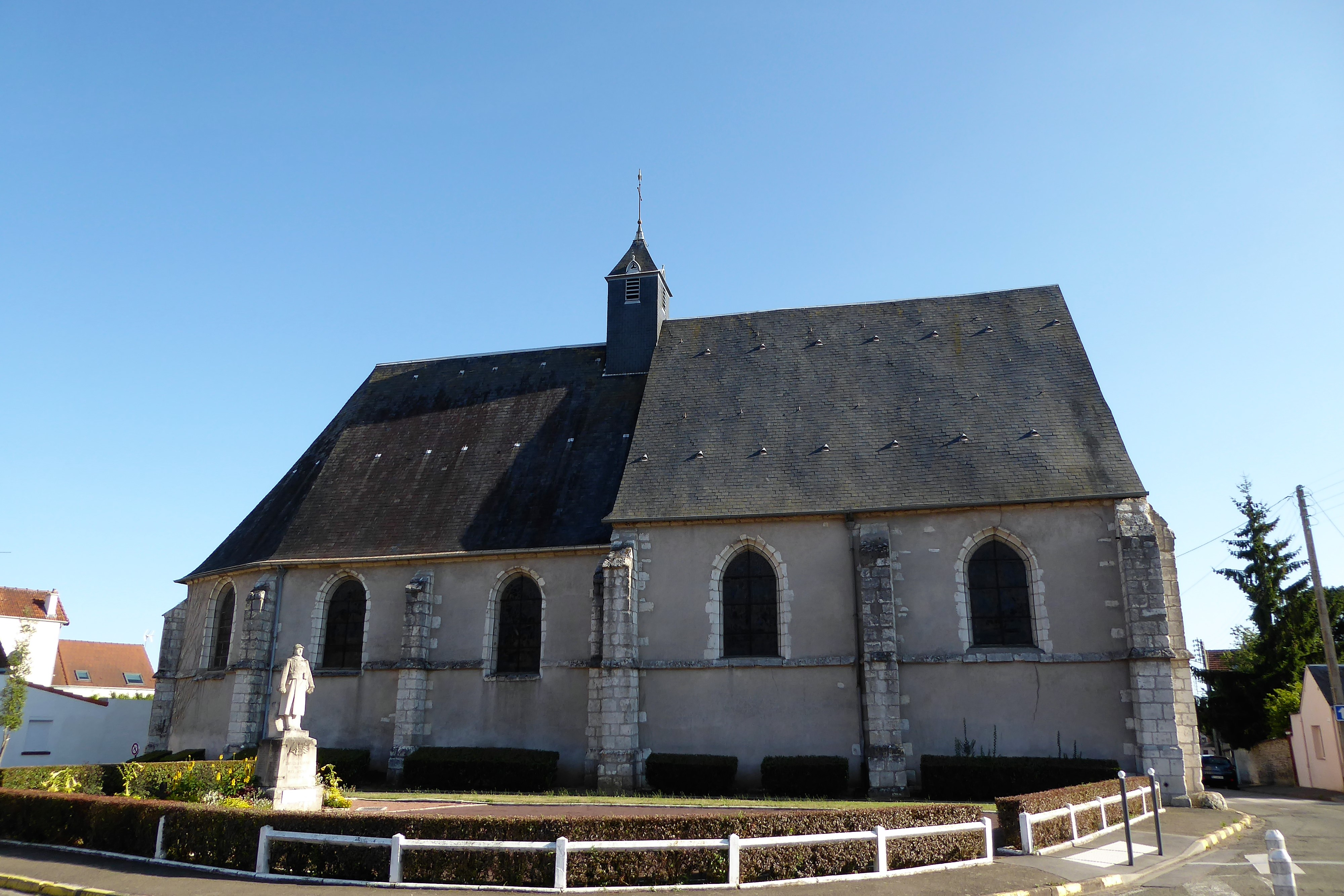 monument aux morts et église Saint-Laumer, Luisant, Eure-et-Loir (France).